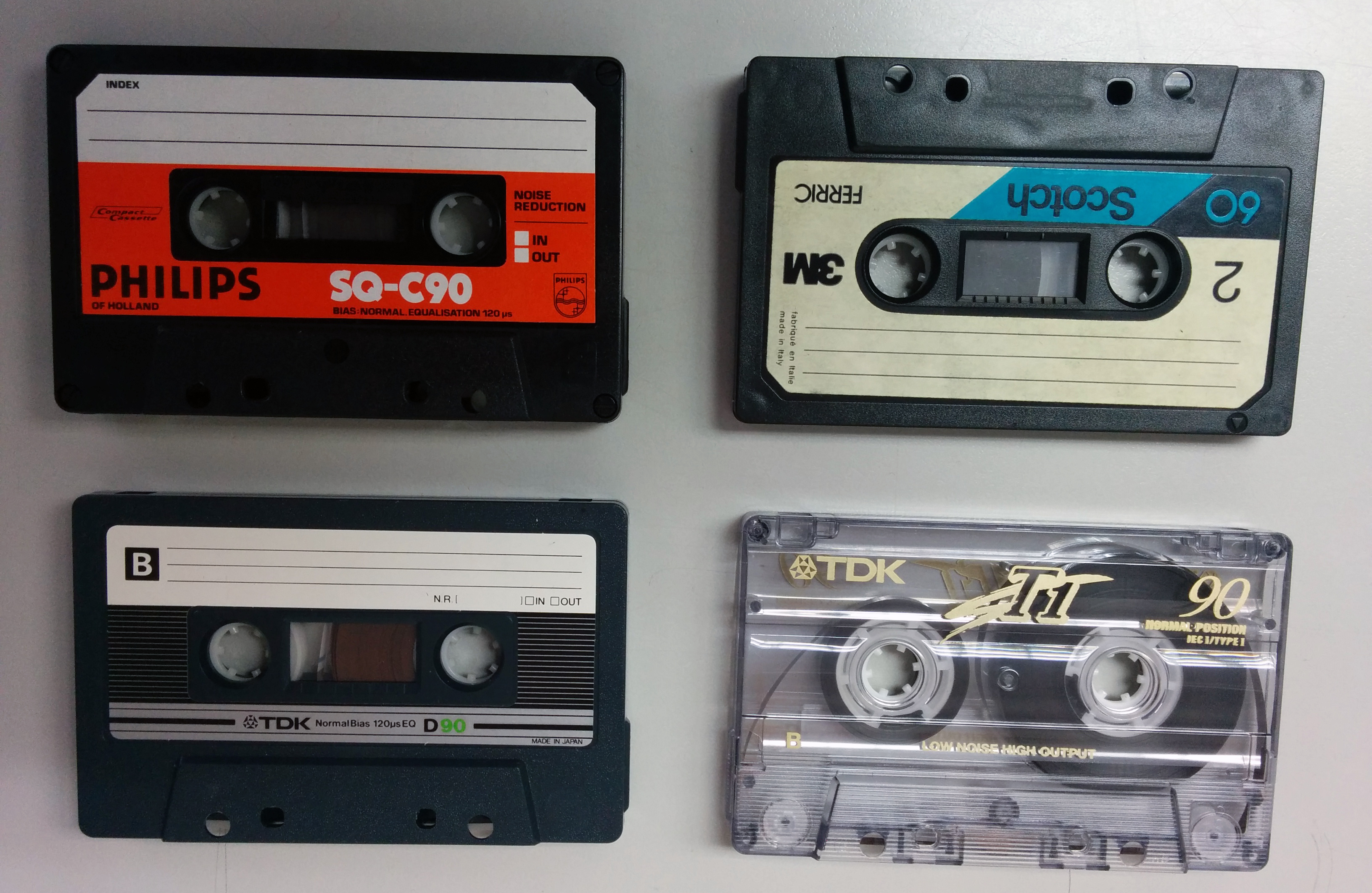 4 cintas de casete diferentes